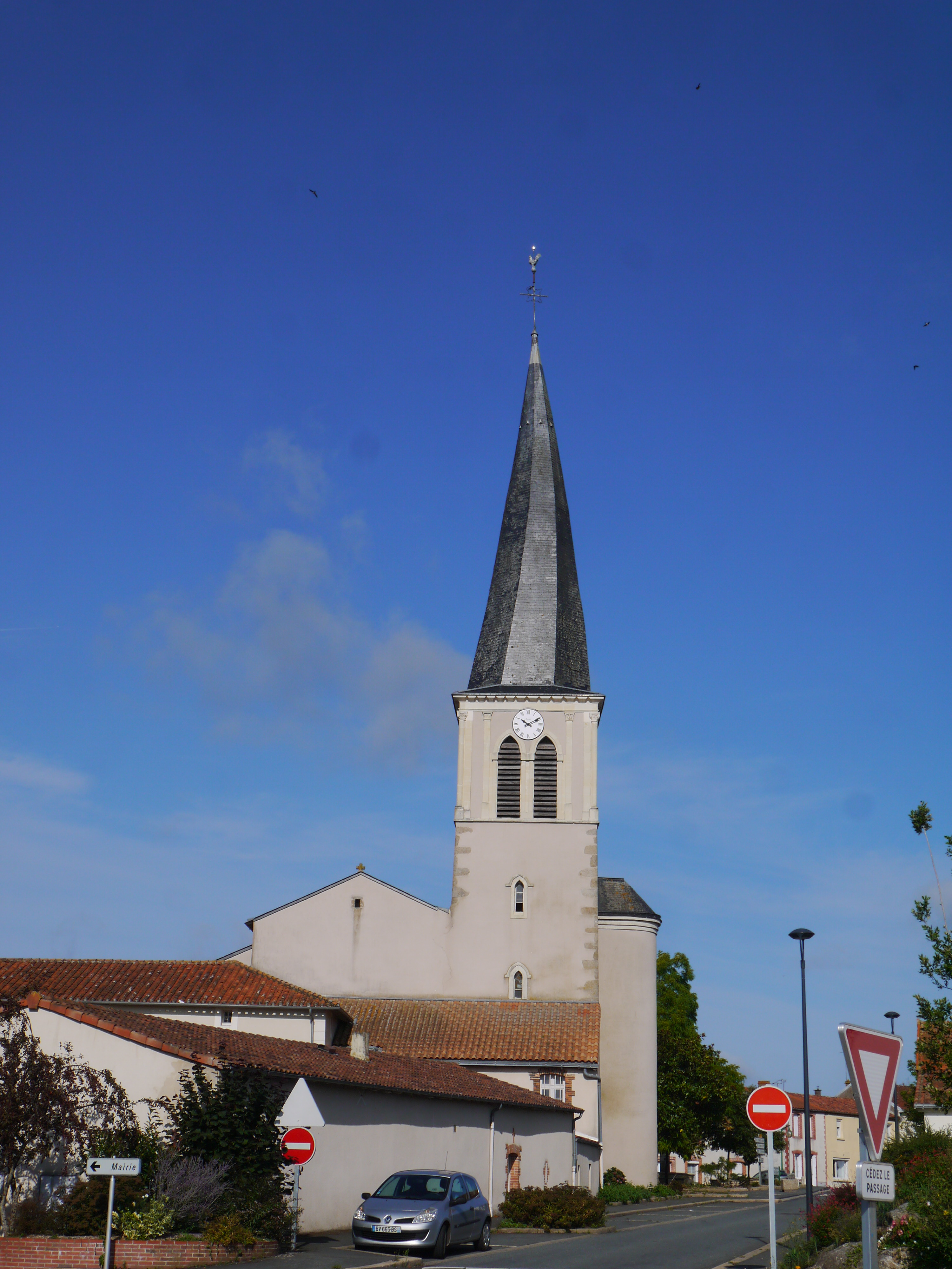 L'église Saint-Gervais et Saint-Protais.